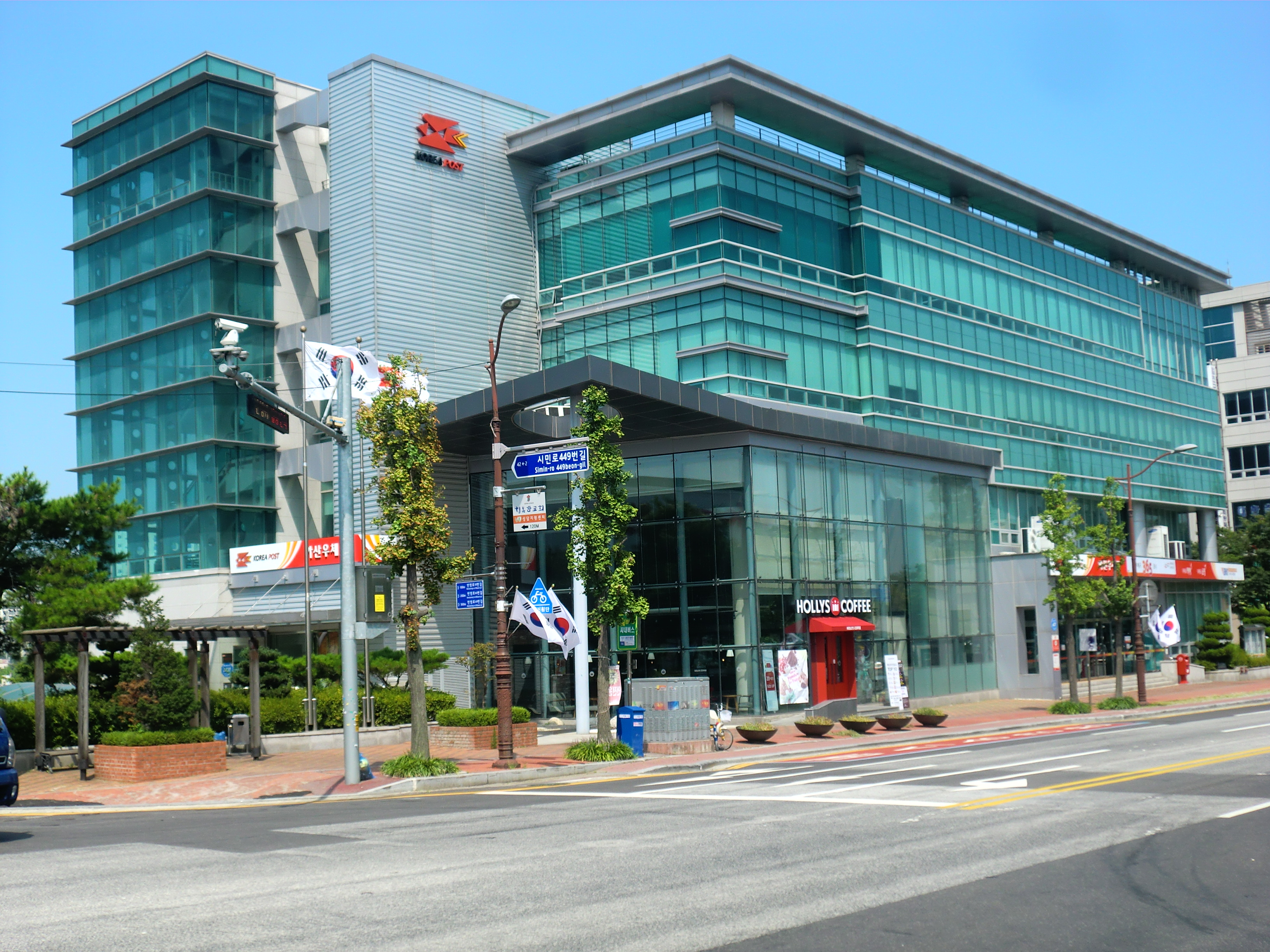 충청남도 아산시에 있는 아산우체국